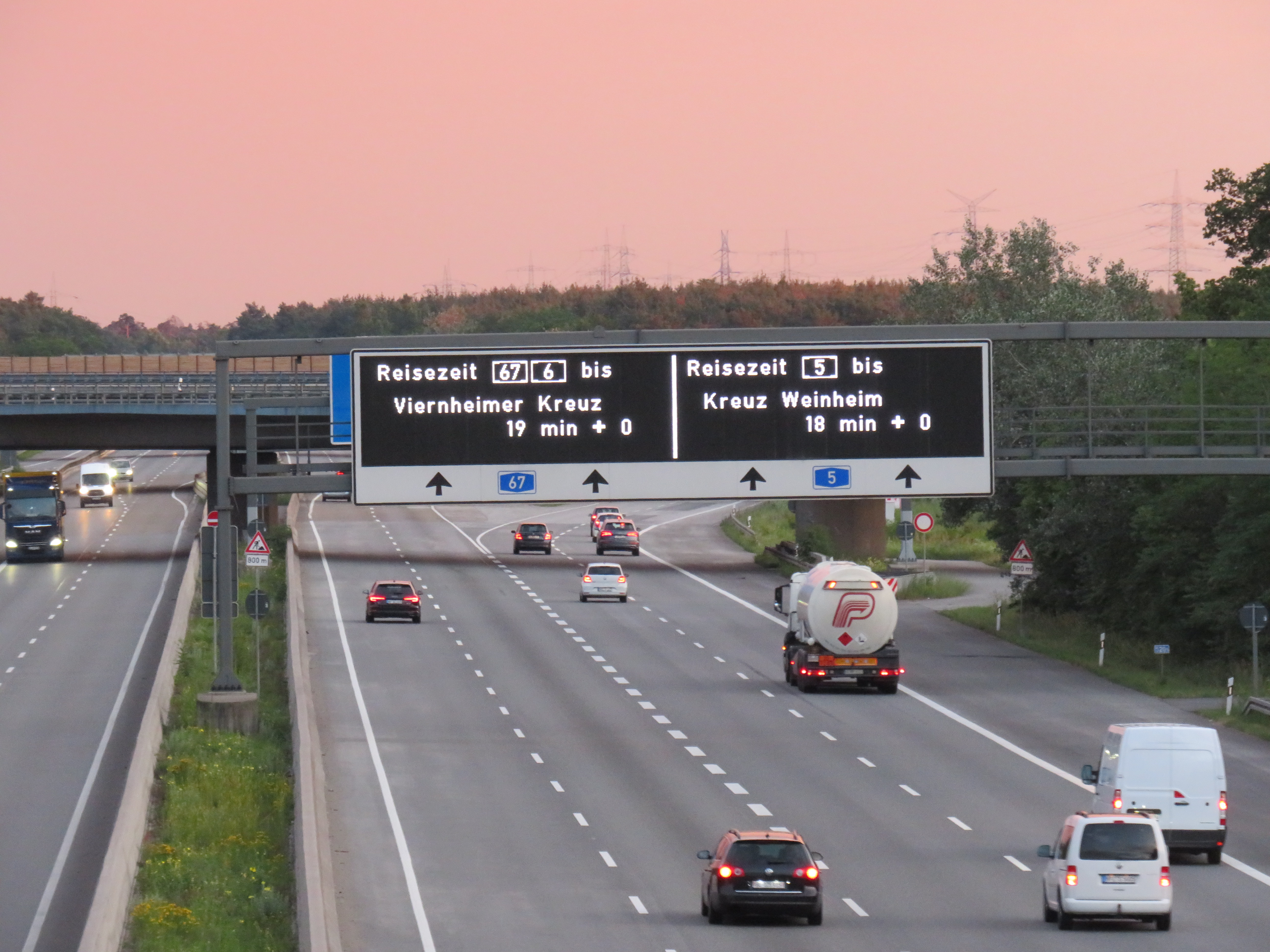 Dynamische Wegweiser mit integrierten Stauinformationen (=dWiSta) der Bundesautobahn 5 nördlich des Darmstädter Kreuzes, Blick von der Brücke der Wilhelm-Leuschner-Straße (B26) Richtung Süden.